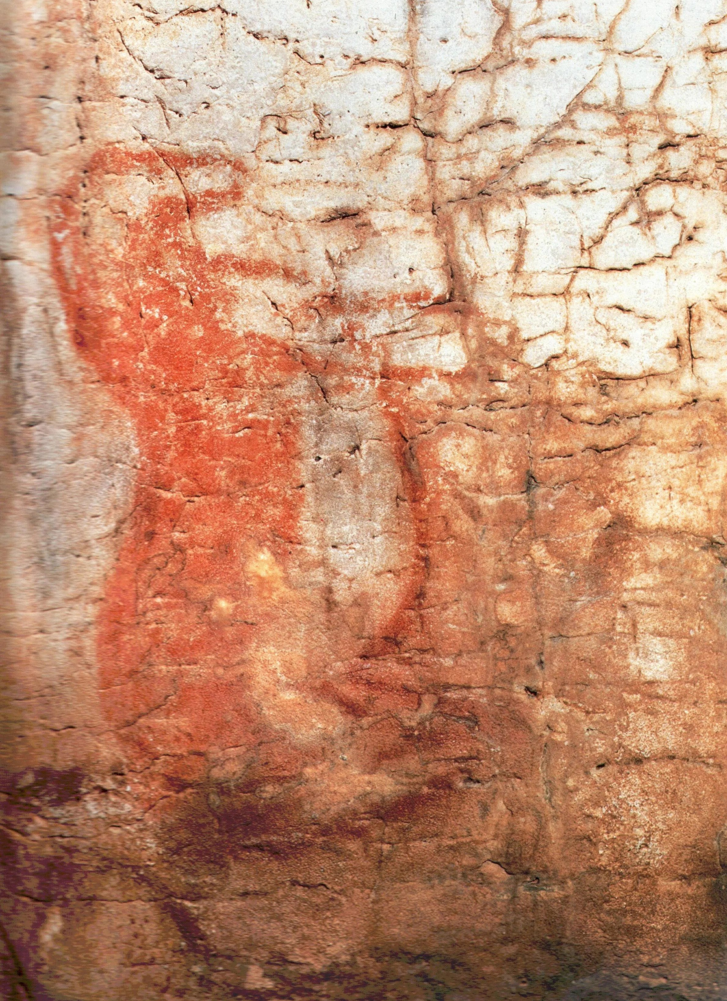 Opera parietale in ocra rossa raffigurante un cavallo